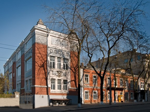 ОХУ им. М. Б. Грекова